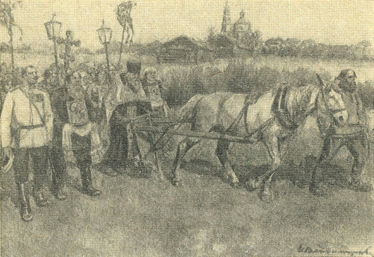 «Первая борозда». И. А. Владимиров. (Государственный музей истории религии и атеизма.)